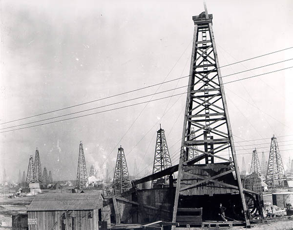 Oil derricks at Burkburnett, Texas